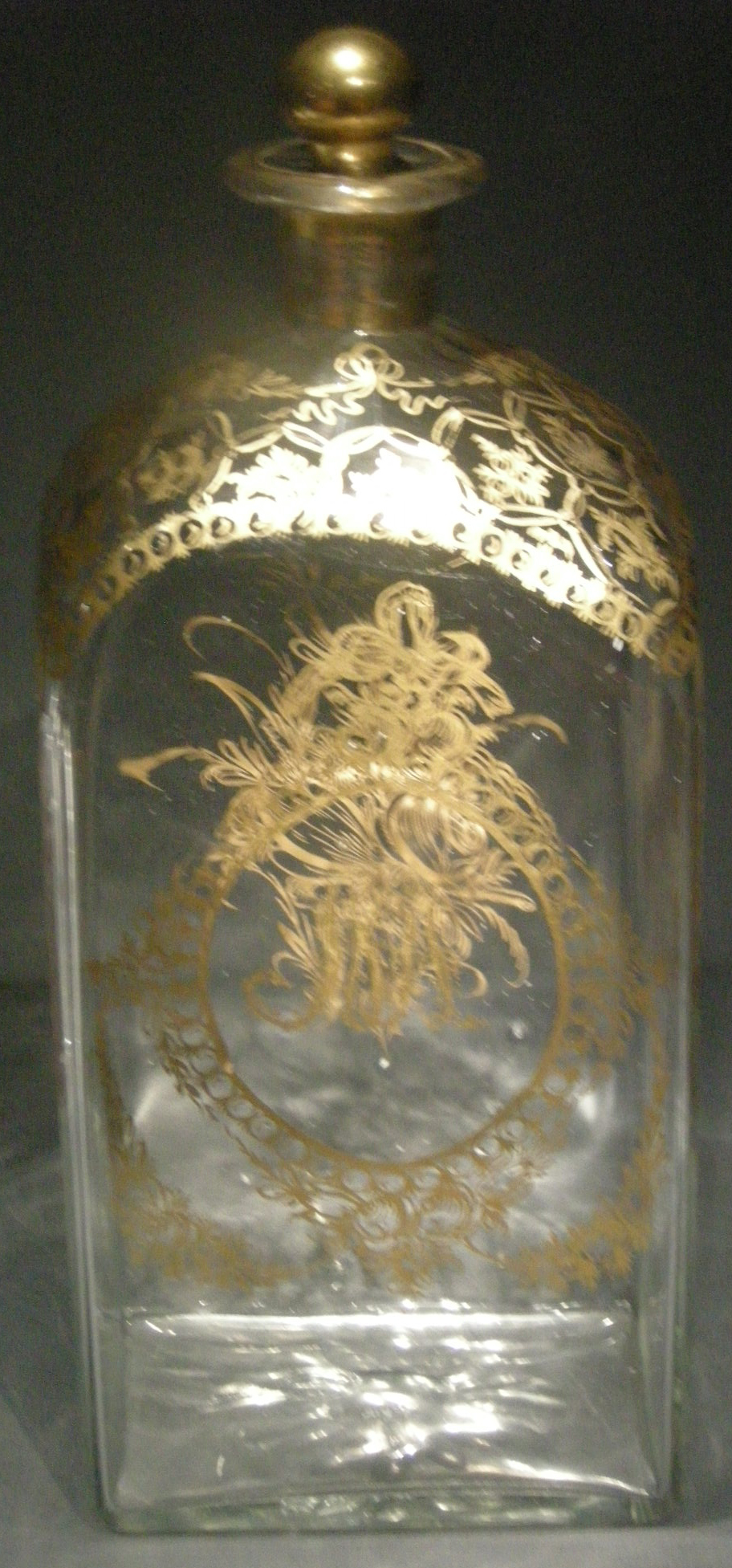 Ngv, vetro di murano, bottiglia, tardo XVIII secolo